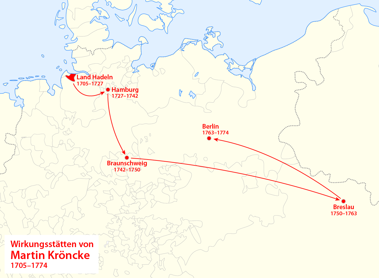 Karte der Wirkungsstätten von Martin Kröncke (1705–1774)